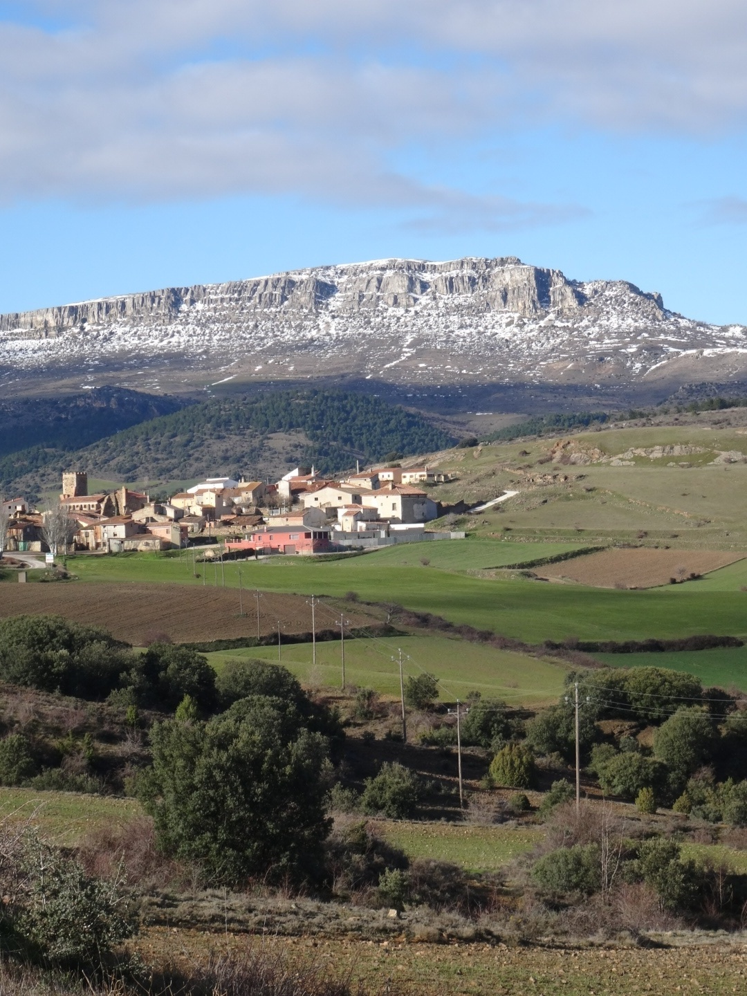 Vista de Bádenas con la sierra de Cucalón al fondo - 2